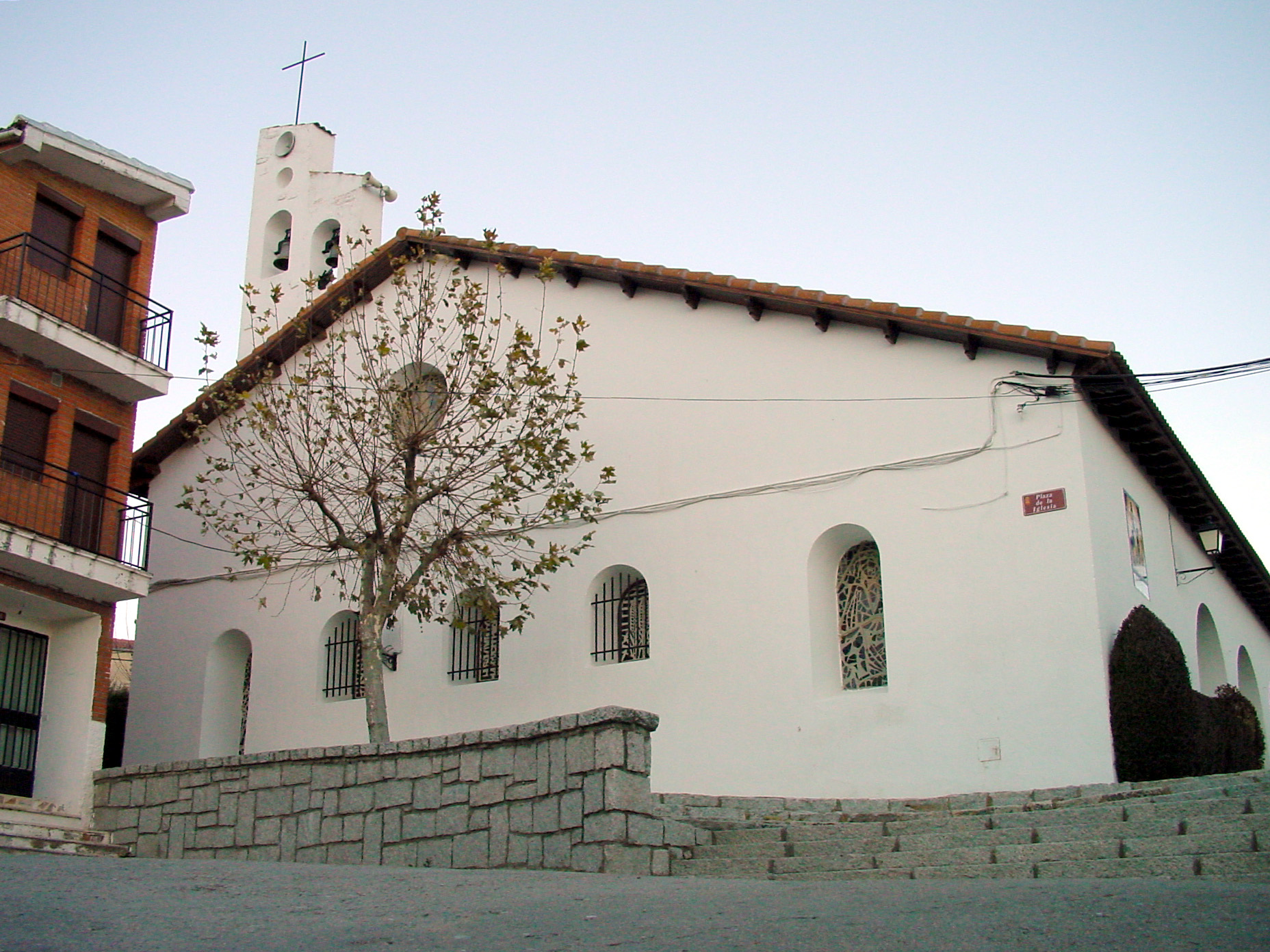 Frontal de iglesia en Villavieja del Lozoya.